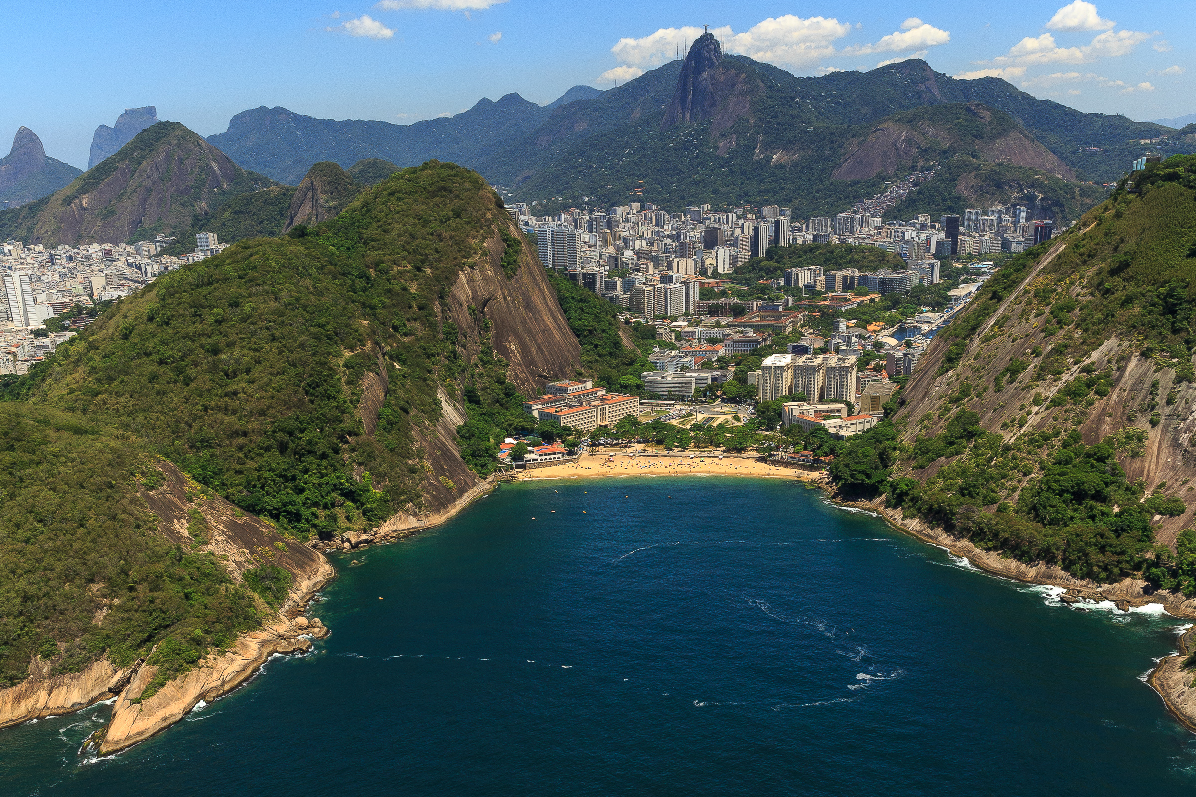 Vista aérea da Praia Vermelha localizada no Bairro da Urca na cidade do Rio de Janeiro